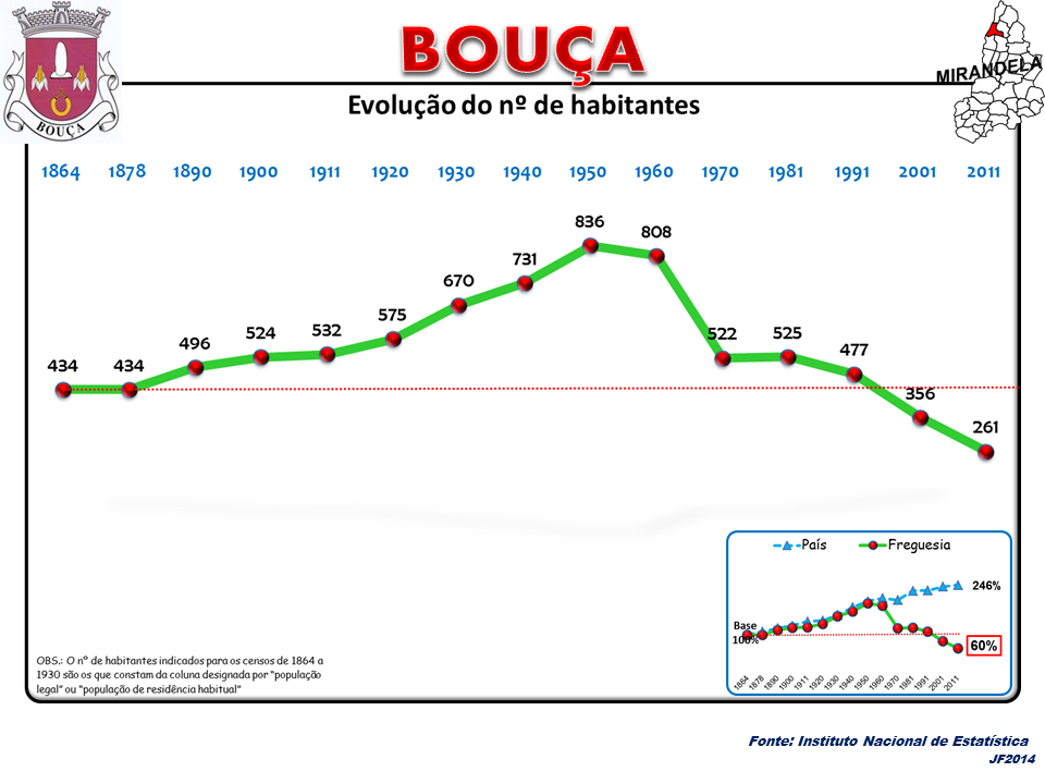 Evolução da População 1864 / 2011